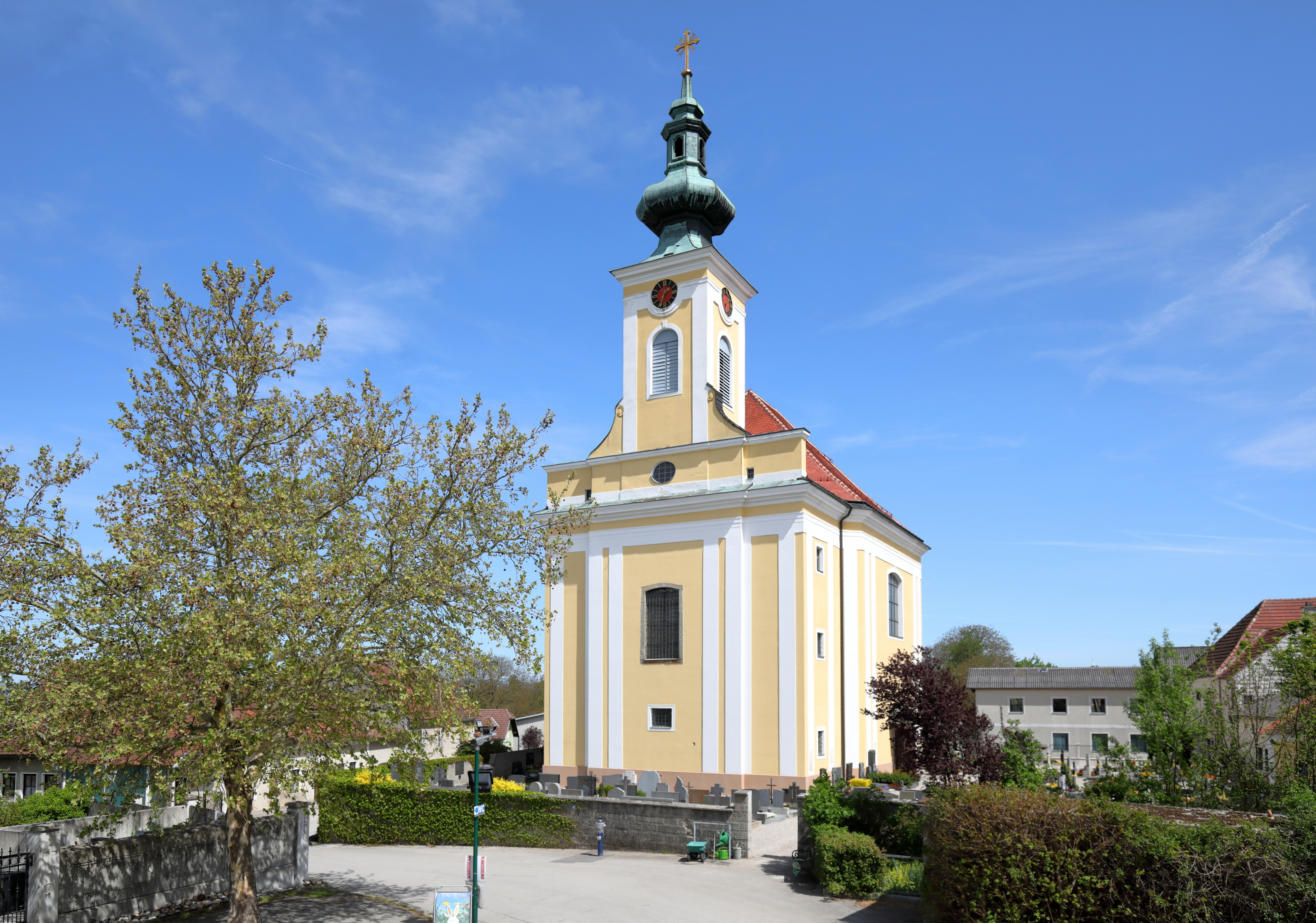 Westsüdwestansicht der röm.-kath. Pfarrkirche hll. Petrus und Paulus in Oed, ein Ortsteil der niederösterreichischen Marktgemeinde Oed-Öhling. Die barocke Kirche, umgeben von einem Friedhof, wurde von 1759 bis 1761 anstelle einer Vorgängerkirche nach Plänen von Paul Ulrich Trientl errichtet.